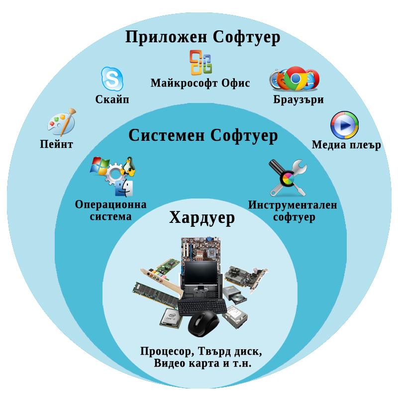 Системният софтуер осигурява връзката между Хардуера и Приложният софтуер